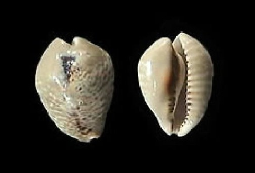 Siphocypraea mus del Golfo de Venezuela